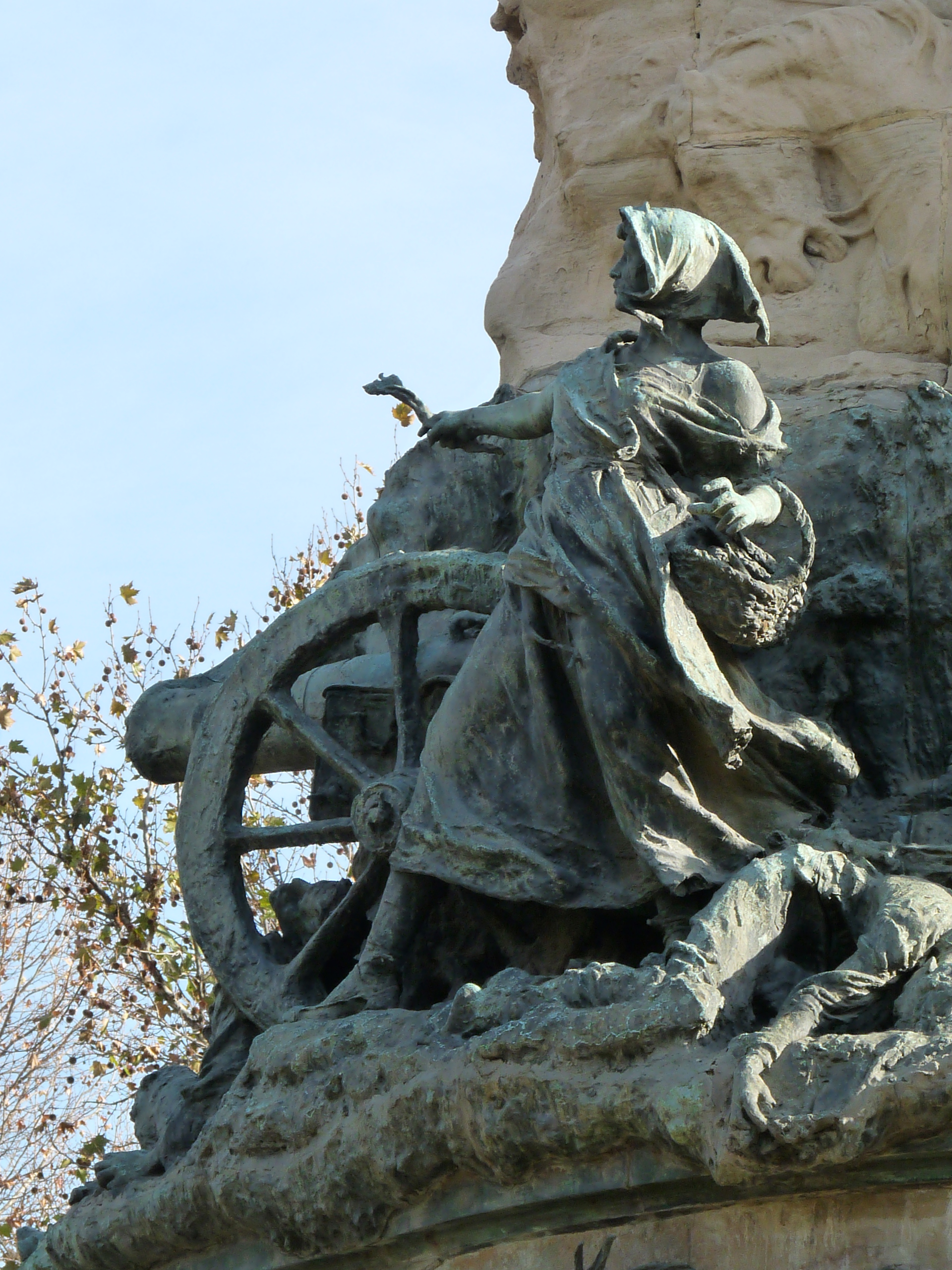 Zaragoza - Monumento a los Sitios - Agustina de Aragón